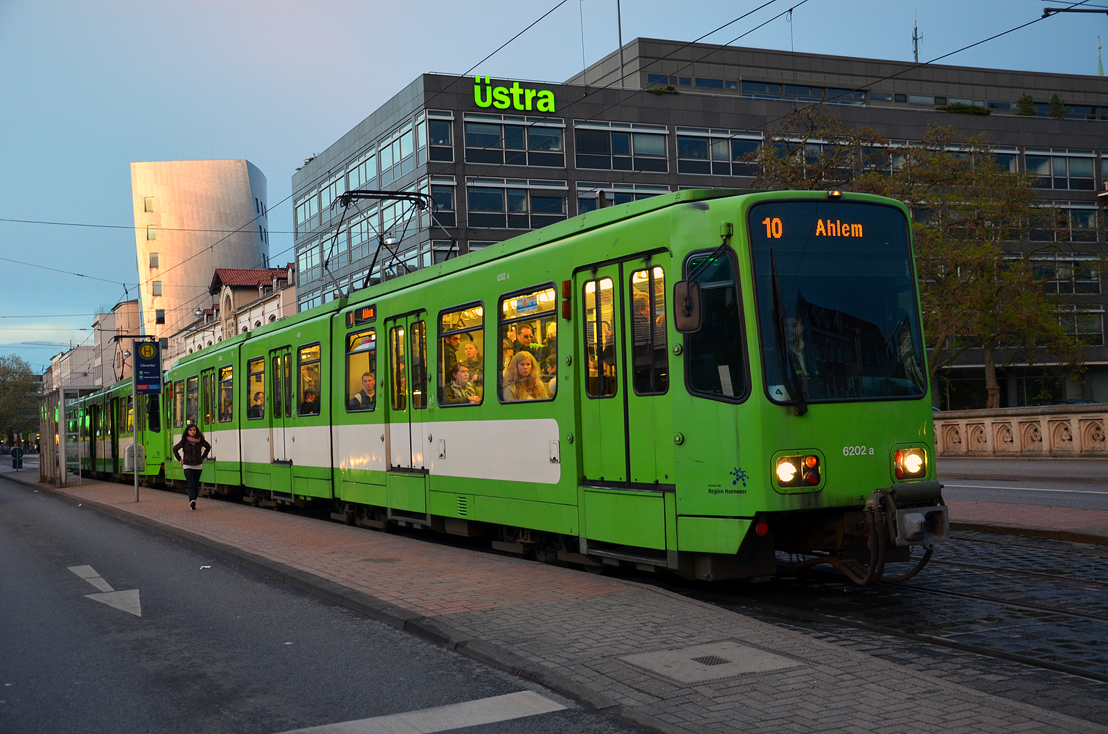 An der - noch - ebenerdigen Haltestelle Clevertor auf der Goethebrücke fährt 2014 ein Triebwagen TW 6000 der Stadtbahn-Linie 10 in Richtung Ahlem an. Im Hintergrund ist der Gehry-Tower zu sehen, verdeckt auch die ehemals Königliche Wagenremise, davor das Verwaltungsgebäude der üstra ...